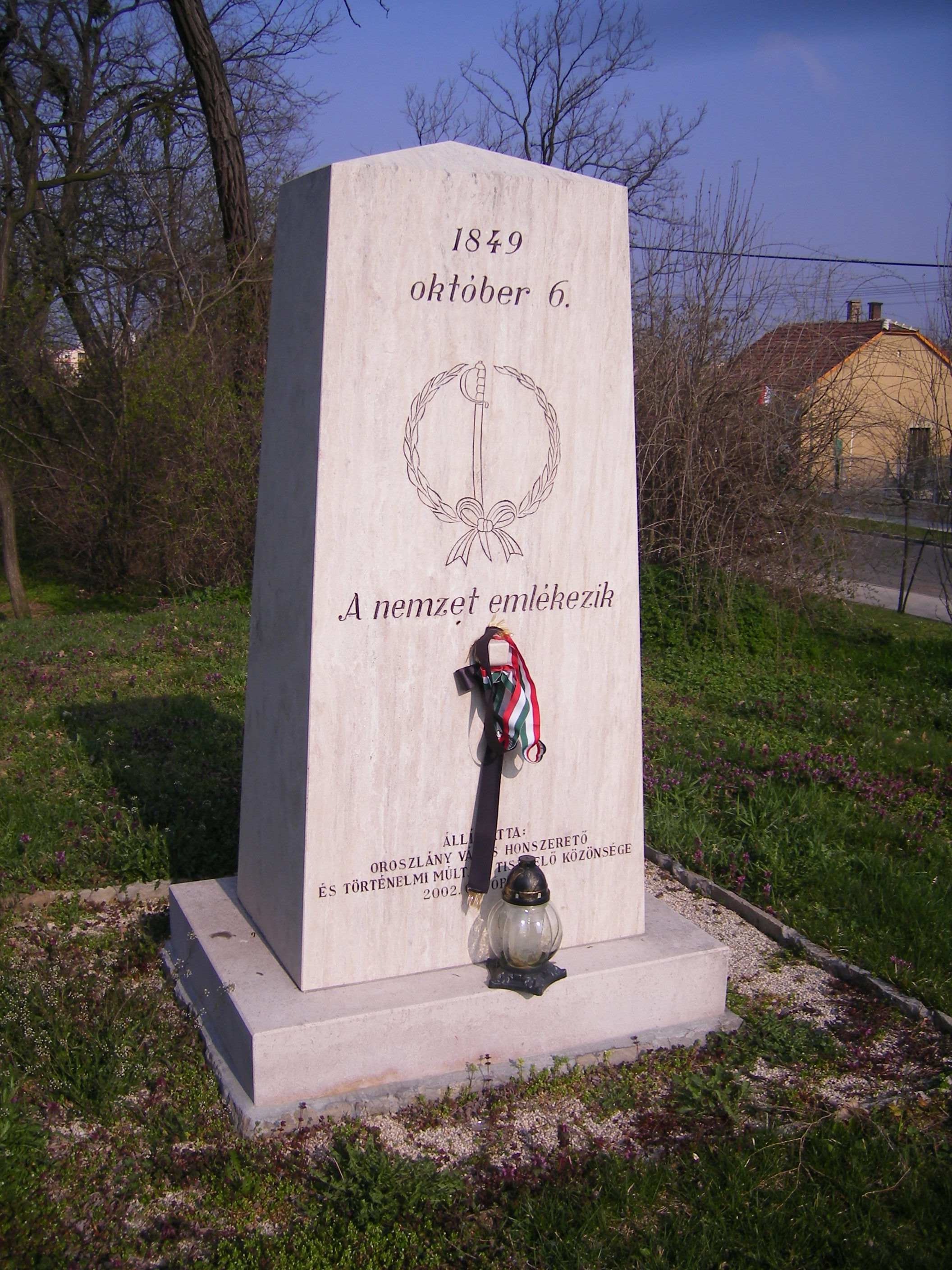 Oroszlány - az aradi vértanúk emlékműve